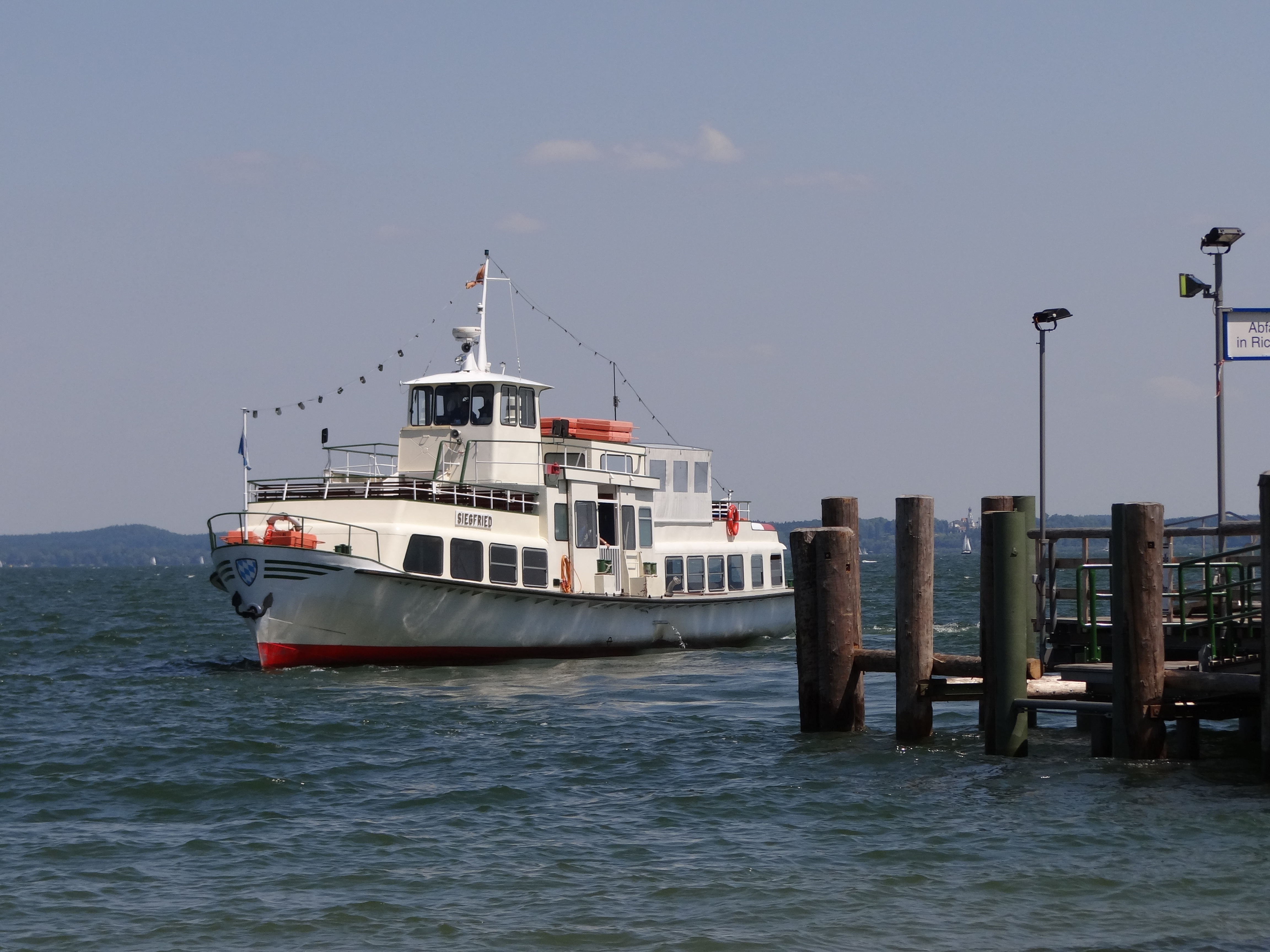 Frauenchiemsee (Insel), 83256 Chiemsee, Germany